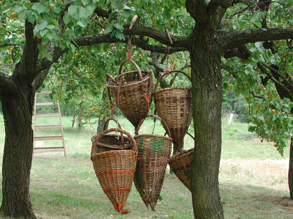 Zistel, traditionelle Erntekörbe im Wachauer Marillenanbau